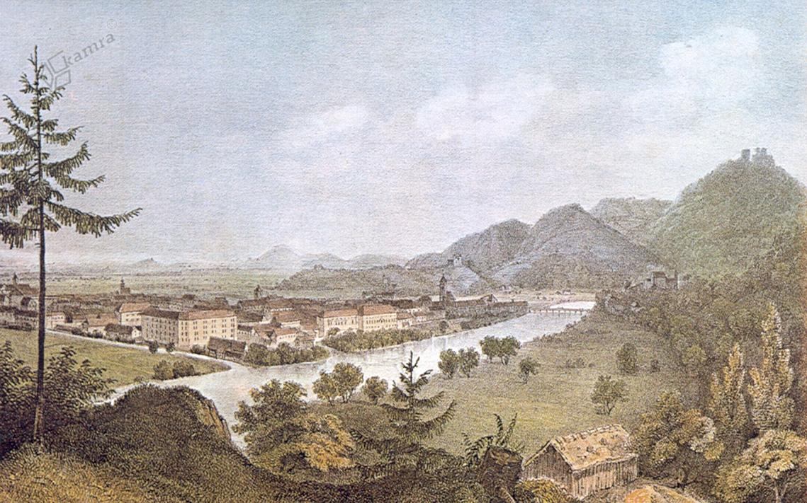 Celje